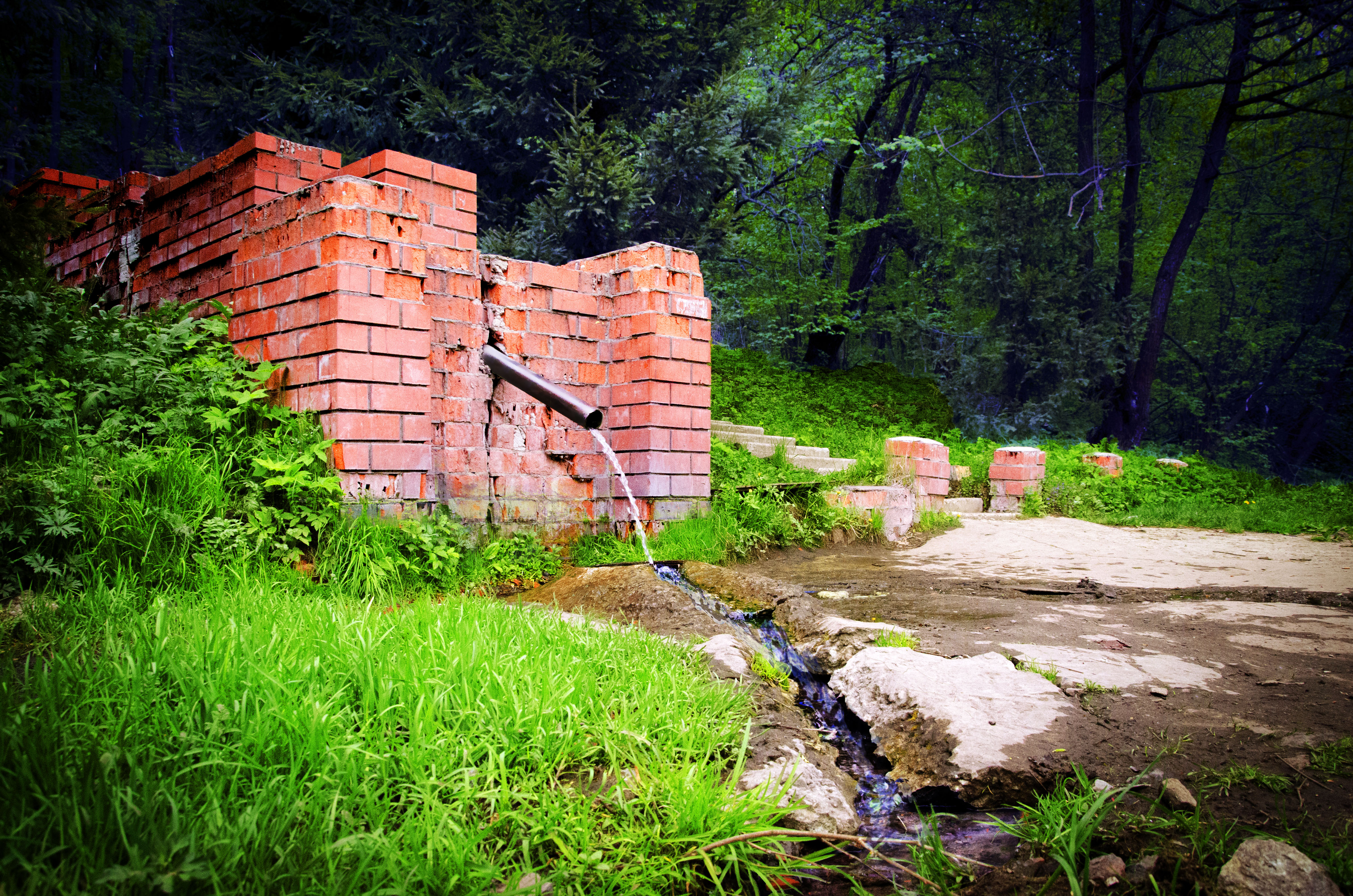 Текущий статус: Перспективный Категория: памятник природы Значение: Региональное Местоположение ООПТ в структуре административно-территориального деления: Центральный федеральный округ›Курская область›Железногорский район Обоснование создания и ее значимость: Гнаньский источник Святителя Николая. Известен с 17 века, питьевая вода с отличными вкусовыми качествами. Является одним из достопримечательных мест Железногорского района. Нормативная правовая основа функционирования: Постановление администрации Курской области от 20.07.2012 №607-ПА Об утверждении Схемы развития и размещения особо охраняемых природных территорий в Курской области на период до 2020 года 20.07.2012 607-ПА This image is related to the protected area of Russia number 4610025